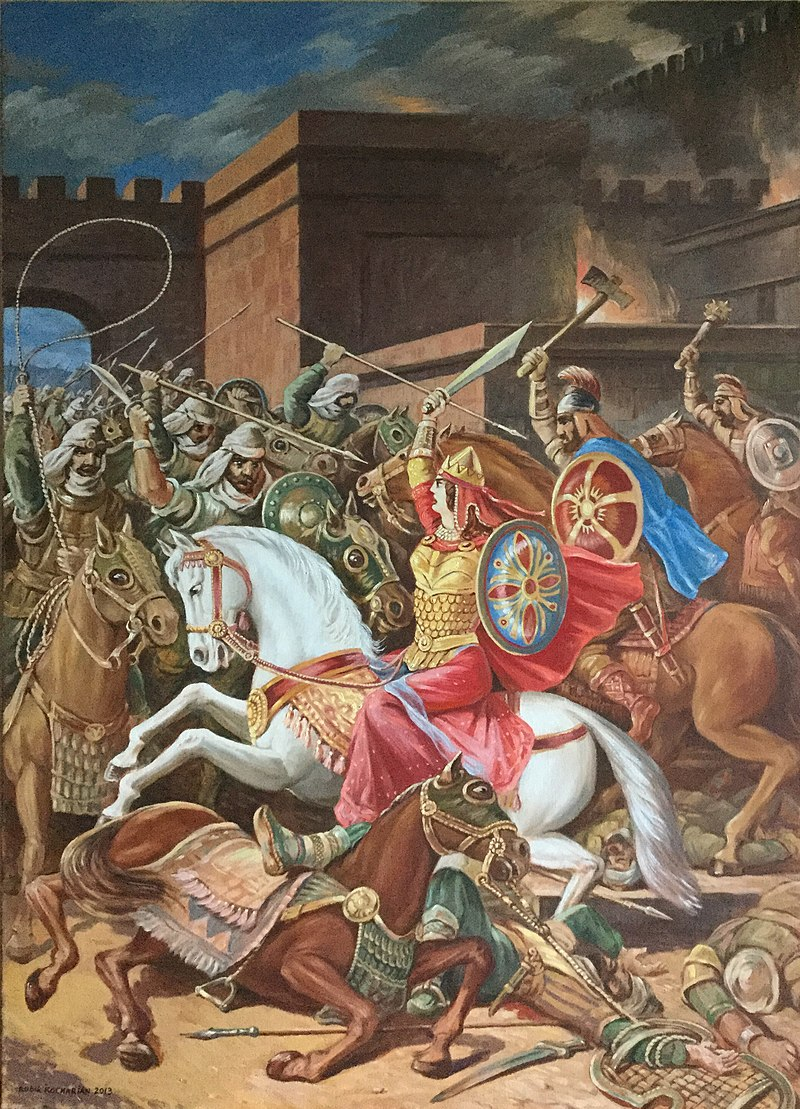 остання битва вірмен проти сасанідського короля Шапура II